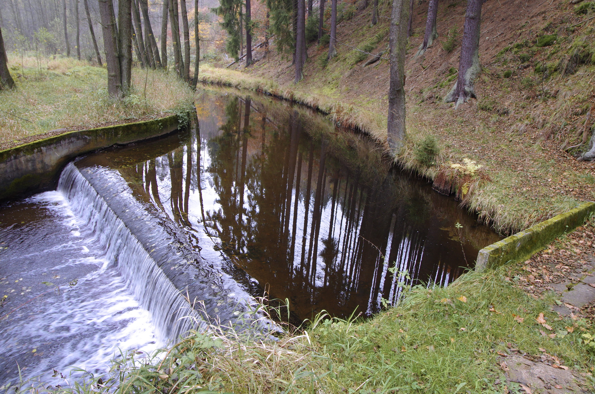 Velká Libava nad obcí Libavské Údolí, okres Sokolov